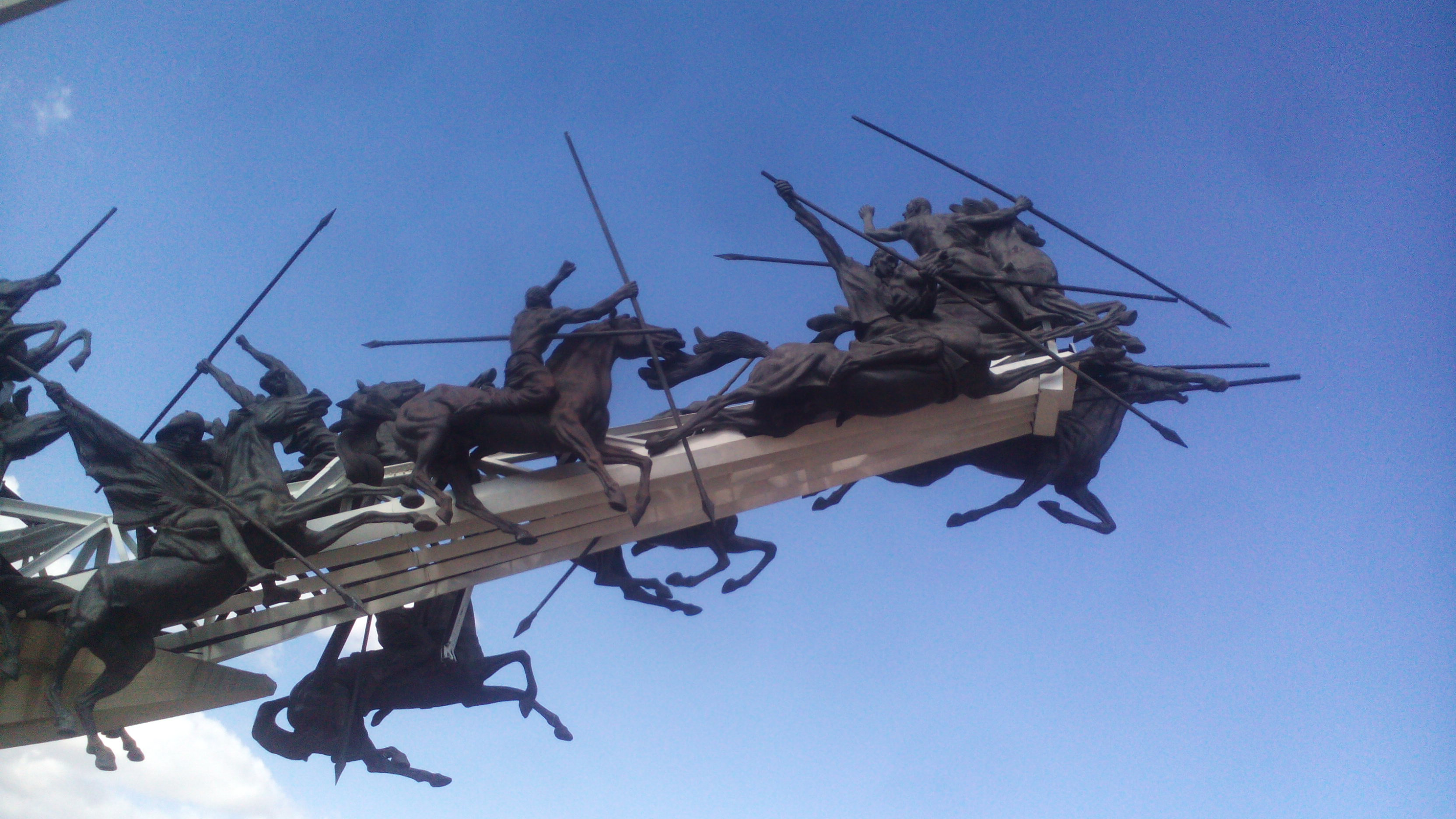 Detalle, monumento a la batalla del Pantano de Vargas. 25 de julio de 1819